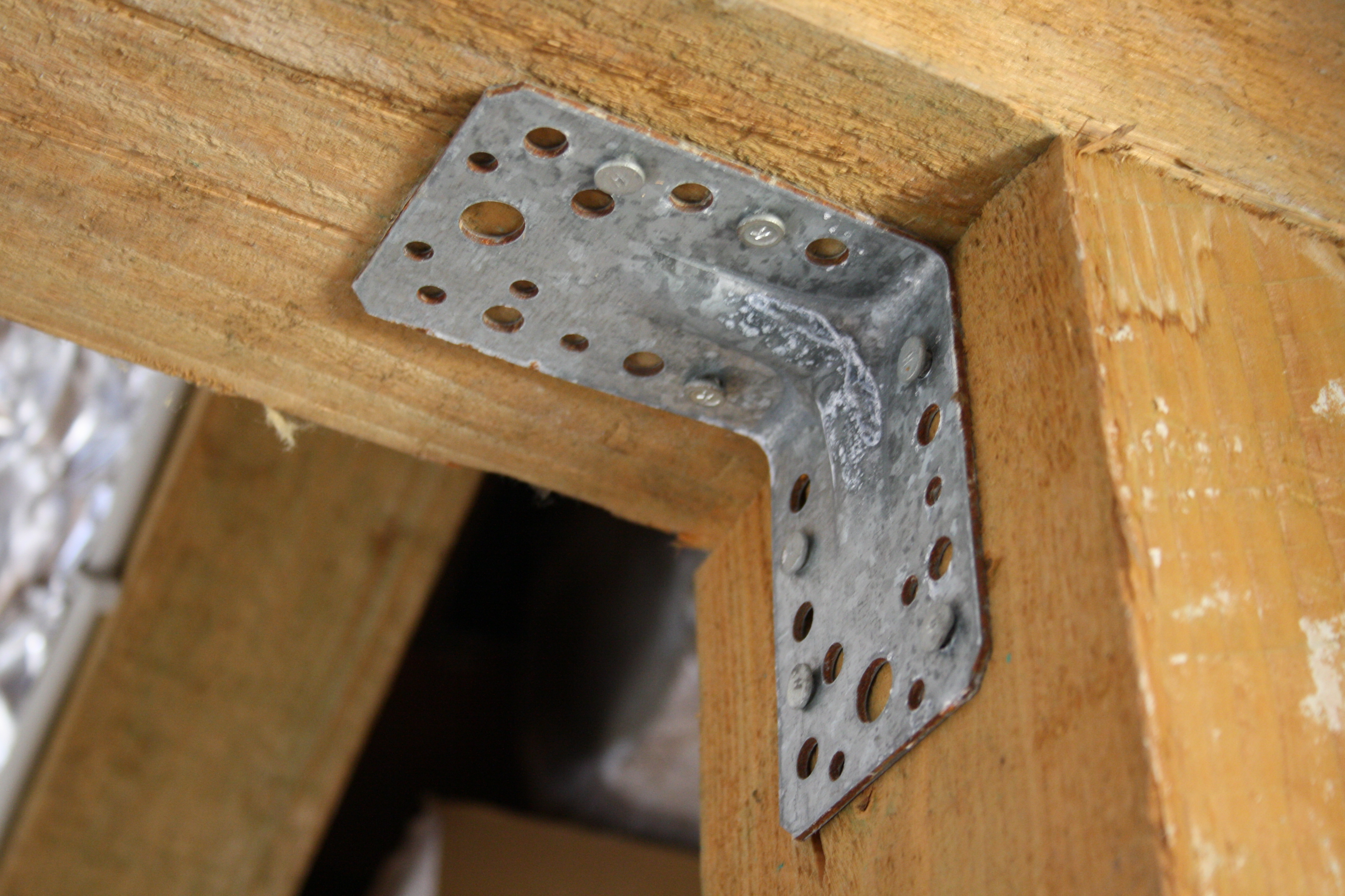 Winkelverbinder in einem Dachstuhl